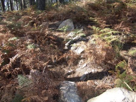 Vestígio do Casto Calbo